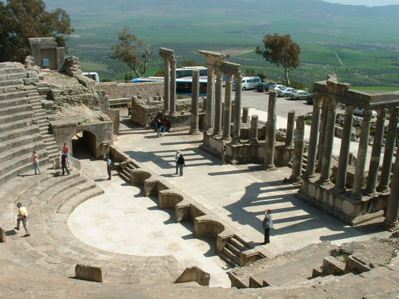 Photographie personnelle (Asram) du théâtre du site antique de Dougga (Tunisie)